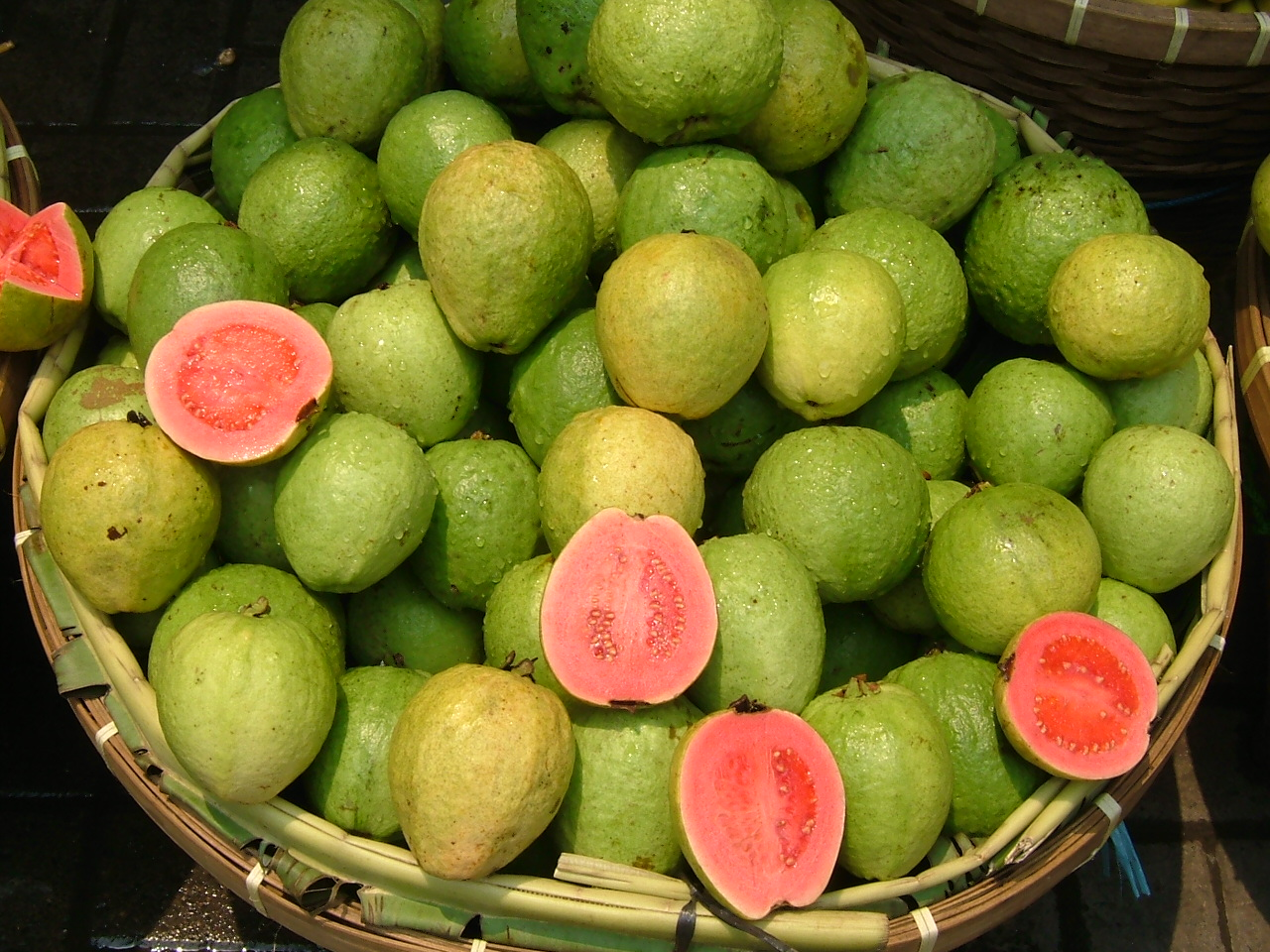 Guava at a fruit stall in Pasar Baru, Jakarta, Indonesia